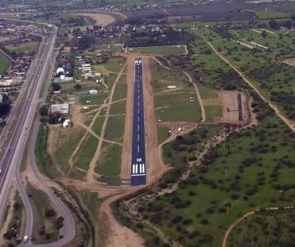 Aeródromo SCCV mirado desde pista 10.